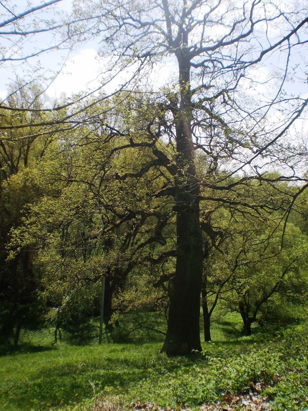 Šventybrasčio ąžuolai, Kėdainių raj.